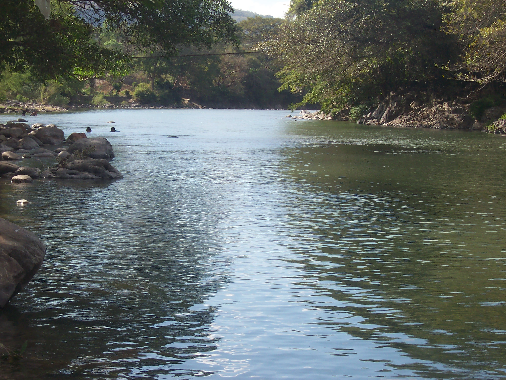 foto del Rio Lempa en el pueblo de Santa Rosa guachipilín